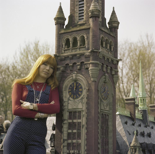 De Duitse zangeres Katja Ebstein tijdens een fotosessie voor het Eurovisie Songfestival 1980